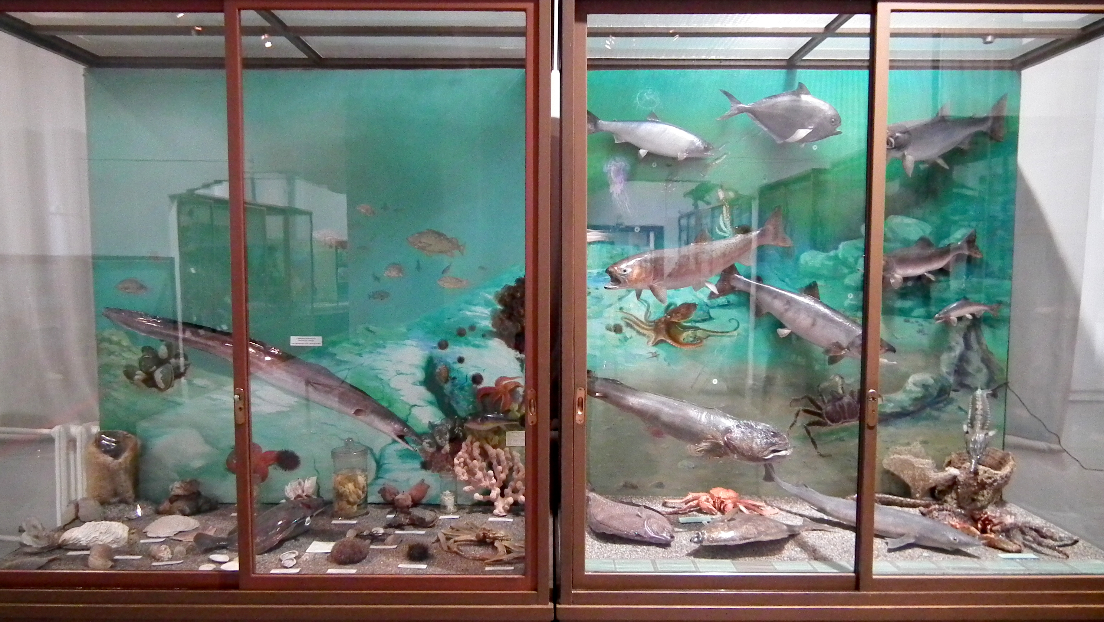 чучела сахалинских рыб